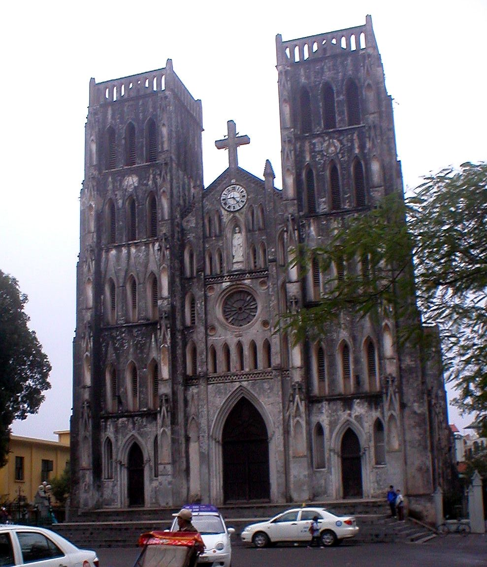 Nhà thờ lớn ở trung tâm thành phố Hà Nội. St-Joseph cathedral in Hanoi (Vietnam) - Consecrated in 1883 Myself-made picture. January 2006 Siren-Com 04:24, 25 January 2006 (UTC)